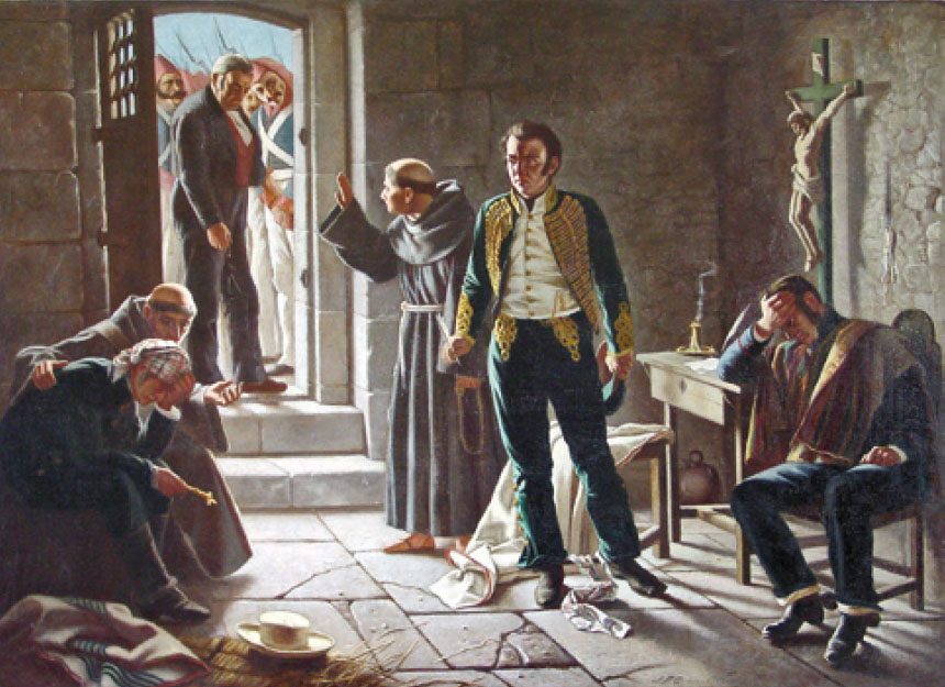 Copia, con leves cambios en el dibujo, del óleo original del pintor uruguayo Juan Manuel Blanes, realizada por el pintor chileno Juan Francisco Gonzalez. La escena pinta los últimos momentos de Carrera antes de ser fusilado en Mendoza el 4 de septiembre de 1821. El sacerdote que está a sus espaldas conminando a los soldados que esperen a que Carrera termine de hablar es José Benito Lamas; a la derecha, desolado, está el coronel José María Benavente -a quien se le conmutará la pena de muerte gracias a las gestiones de su influyente hermano, Mariano- y a la izquierda, asistido por otro franciscano, el coronel Felipe Álvarez.